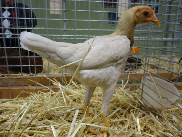 Poule